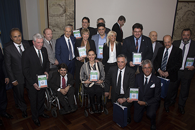 Foto di gruppo dei Premiati nella IV edizione